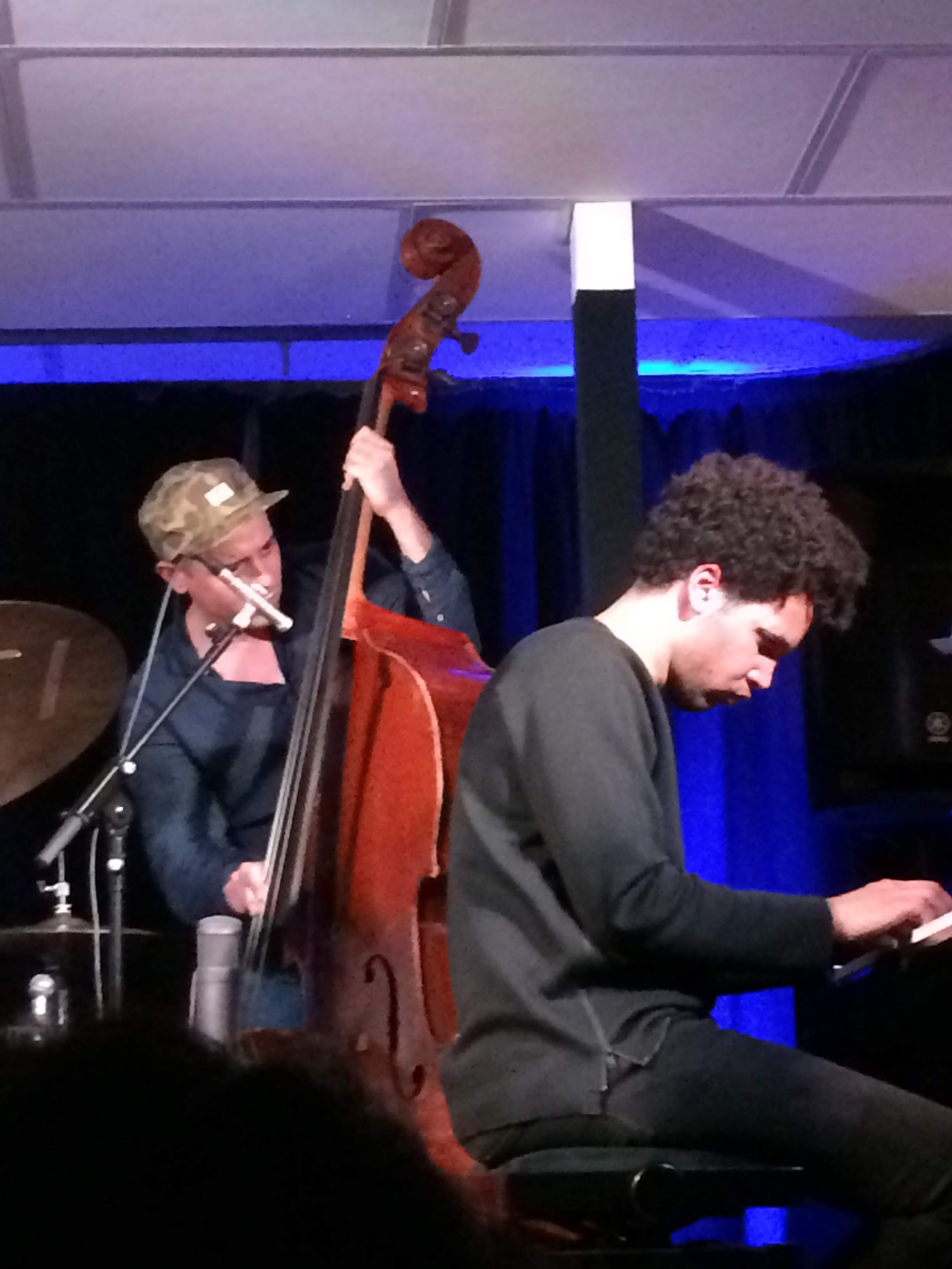 Joachim Govin & Tony Tixier à La Boutique du Val (Meudon) lors de l'enregistrement live du 2e album en leader de Joachim Govin (avec également Ben van Gelder et Gautier Garrigue)